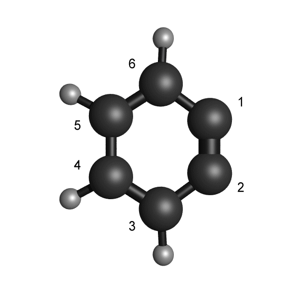 Molecular Model of o-Benzyne